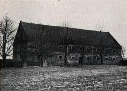 Spichlerz w Dolnej